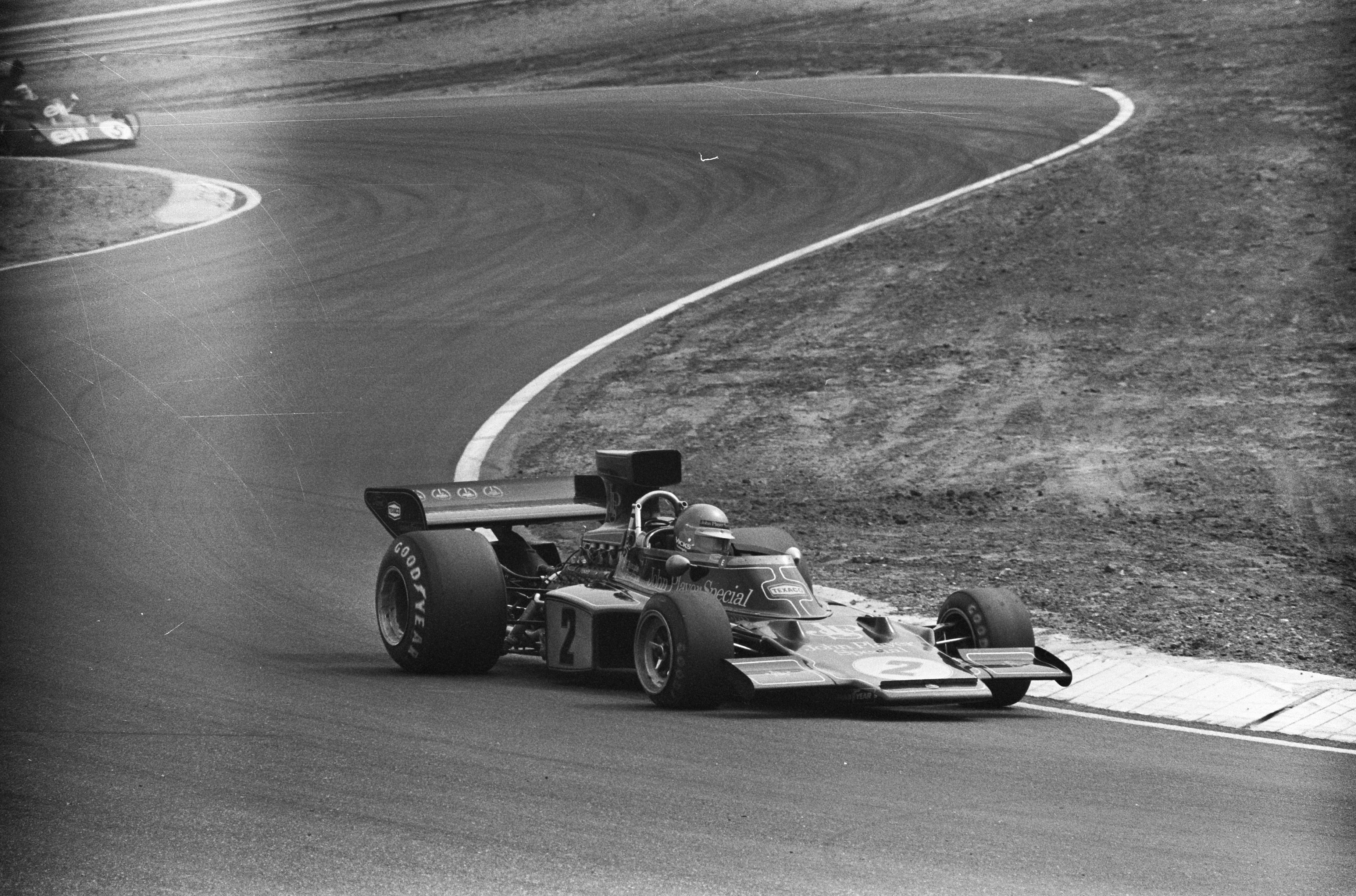 Grote Prijs van Nederland voor Formule I wagens op circuit Zandvoort, de verongelukte wagen.